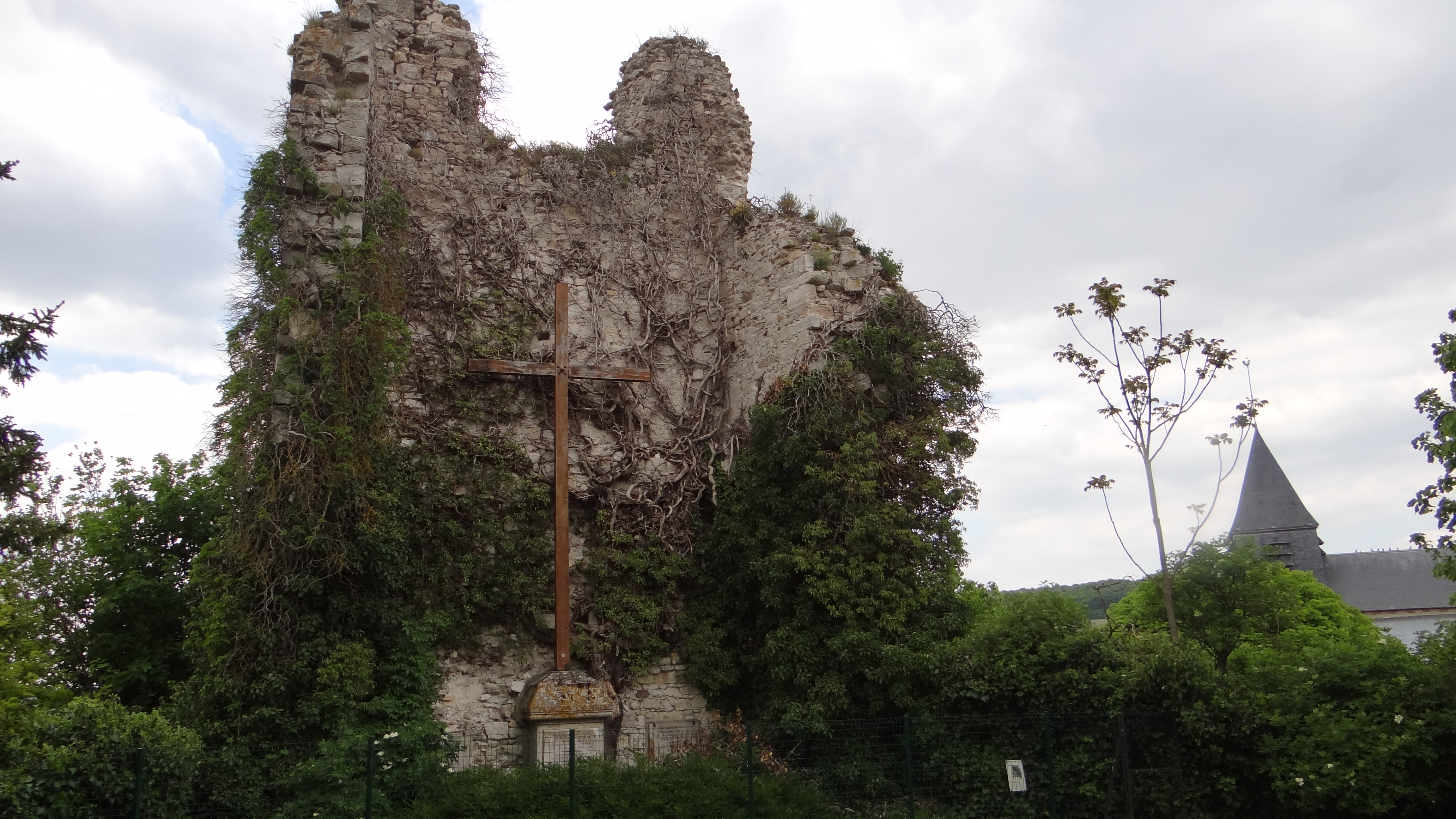 Châtillon-sur Marne, croix, mur du château, toit de l'église.